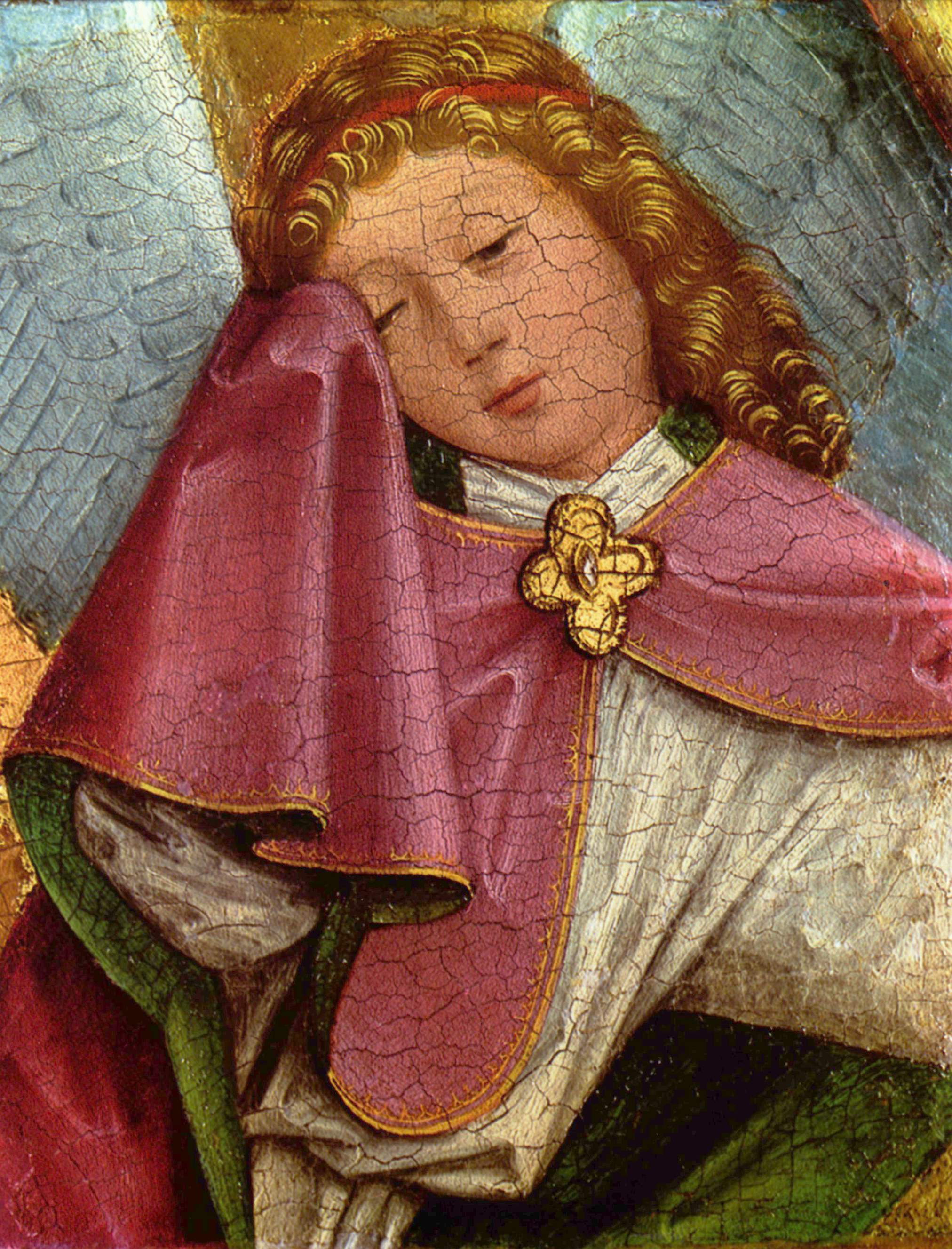 Kreuzigung Christi, Fragment: Trauernder Engel